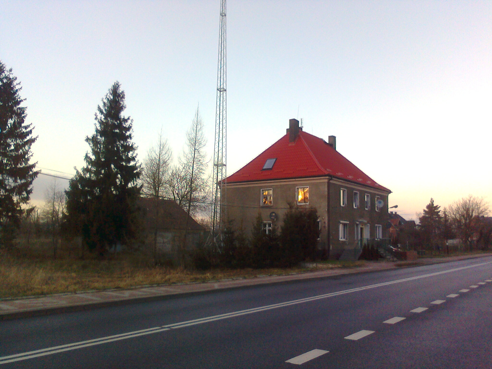 Budynek mieszkalny. Do 2003 roku Strażnica Wojsk Ochrony Pogranicza i Straży Granicznej w Trzebinie – widok od strony czeskiej